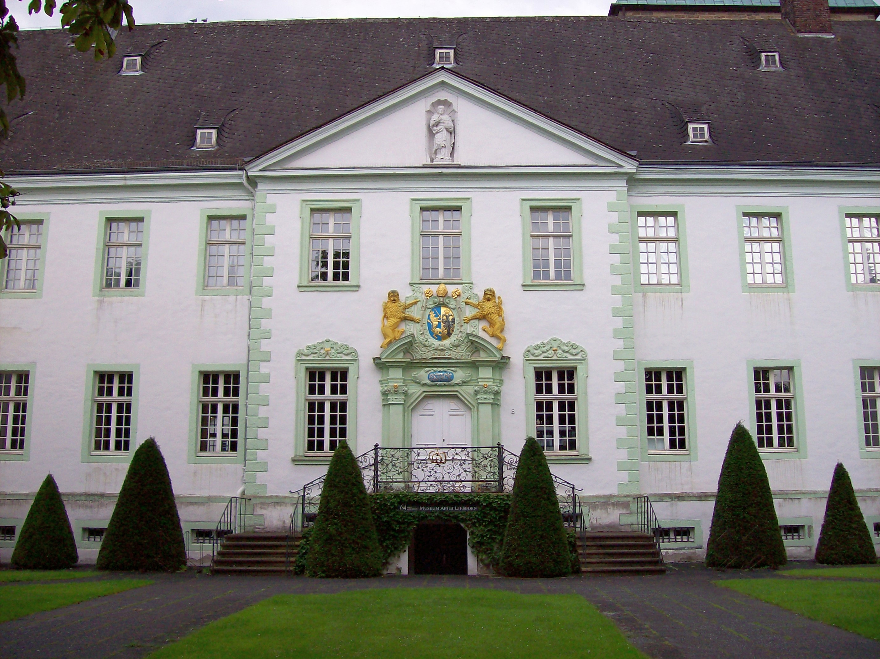 Abtei Liesborn, Portal (Germany)